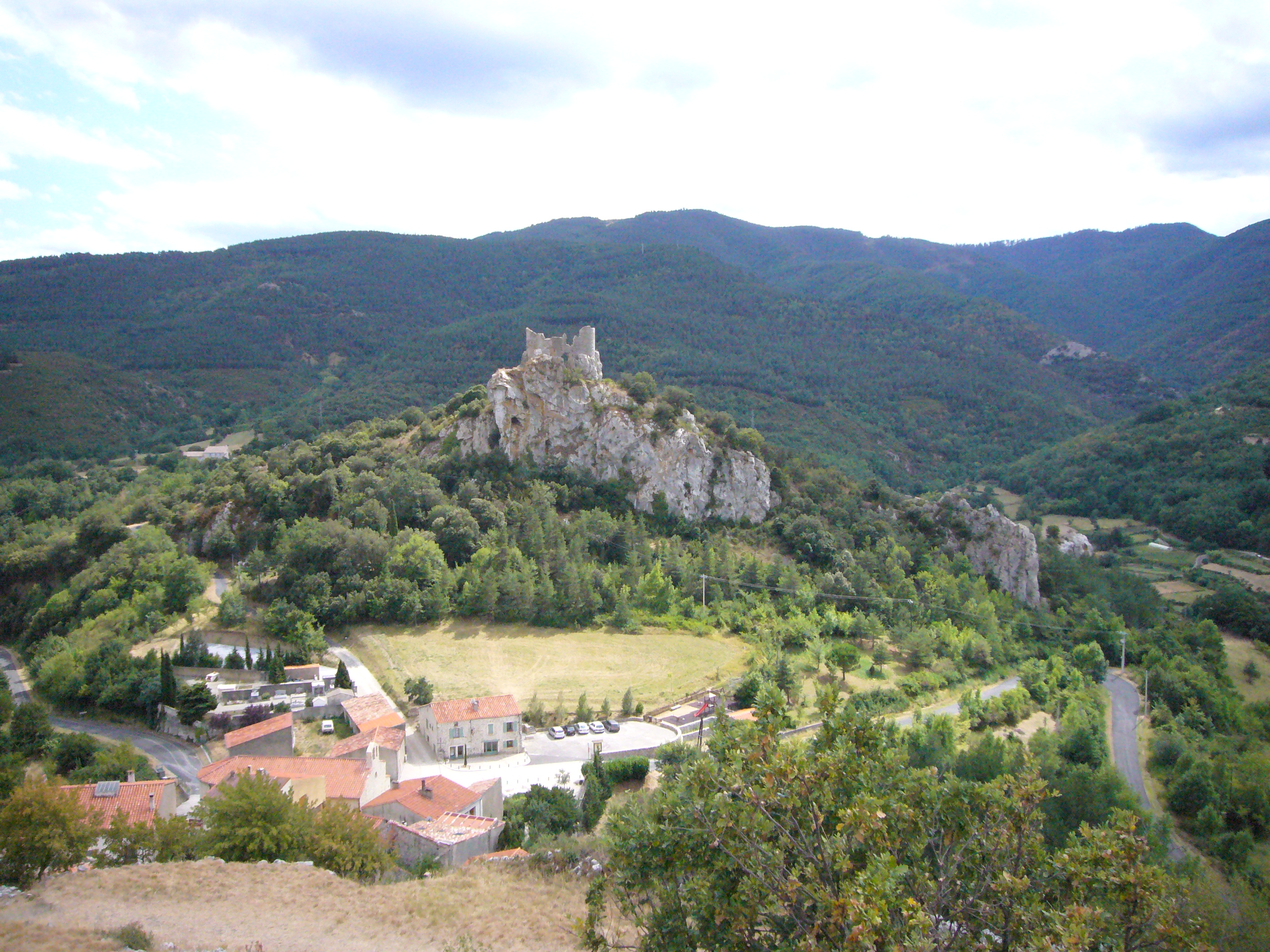 Le village de Fenouillet et le Castel Sabarda (66, France)